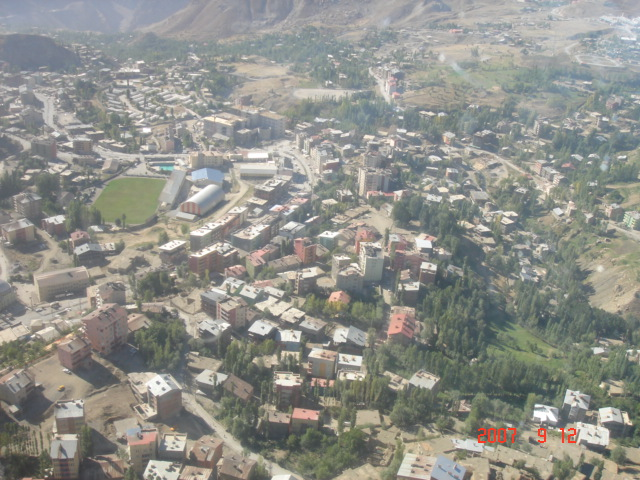 Hakkari...Şehir..